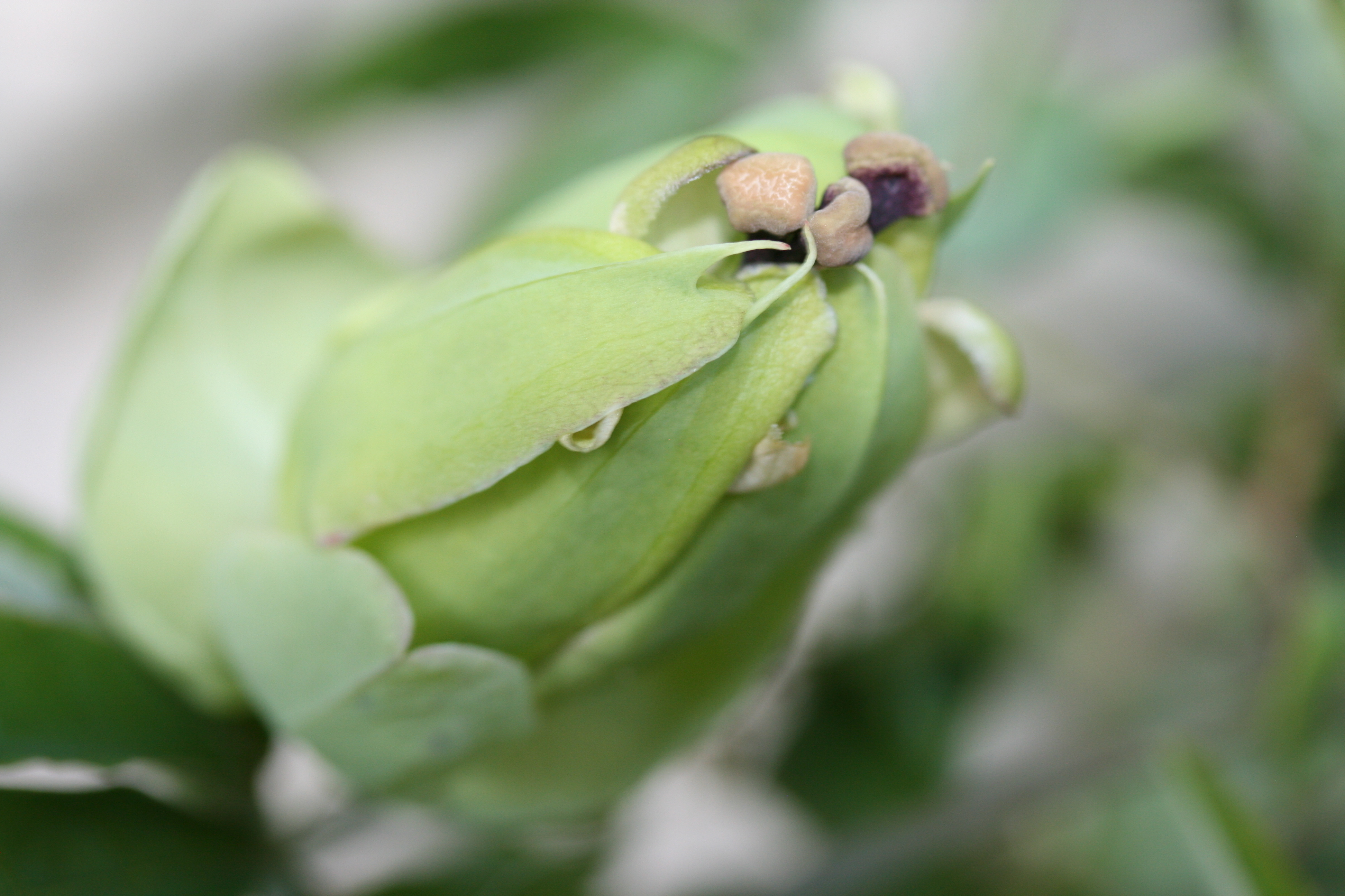 Knospe der Passionsblume